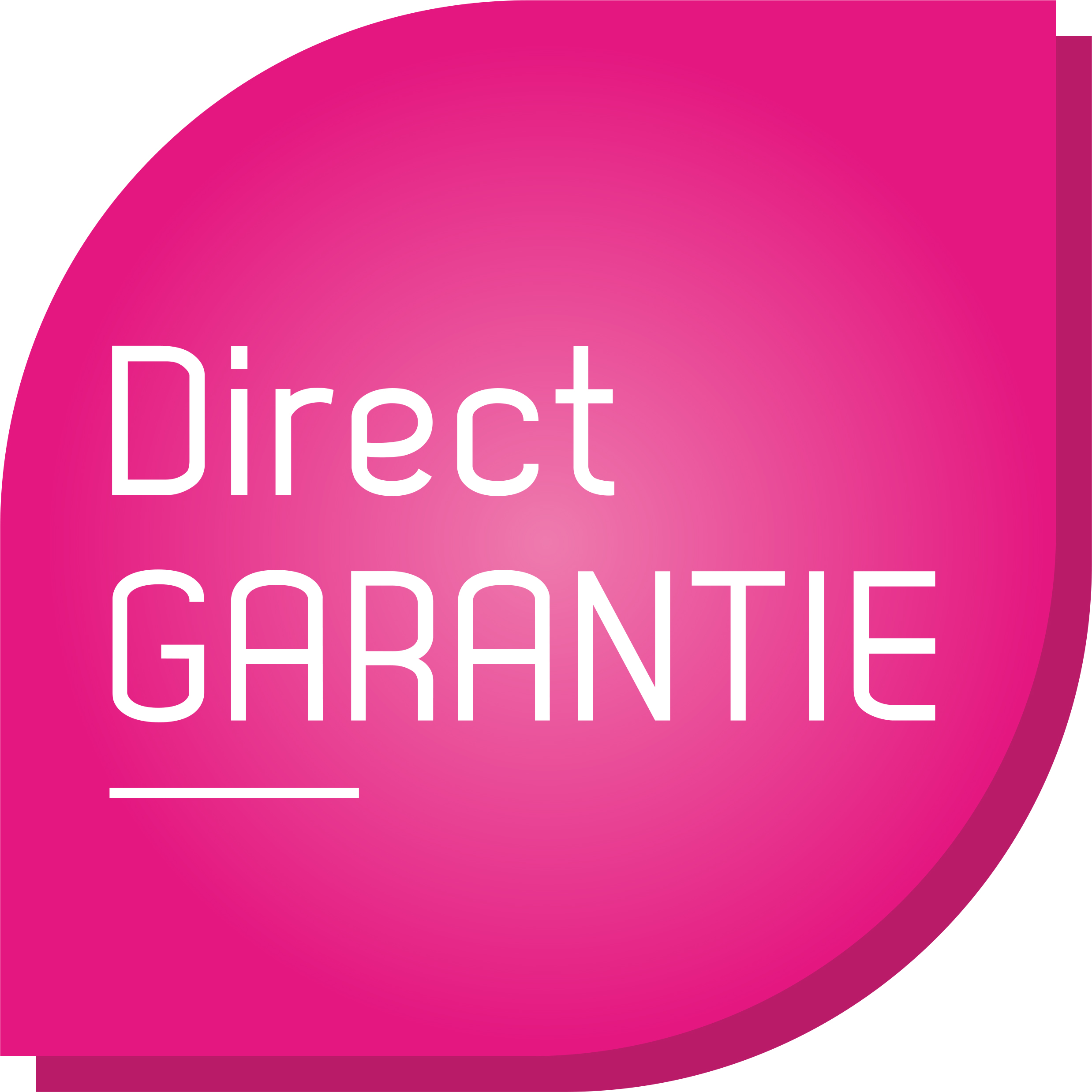 Logo Direct Garantie Particulier